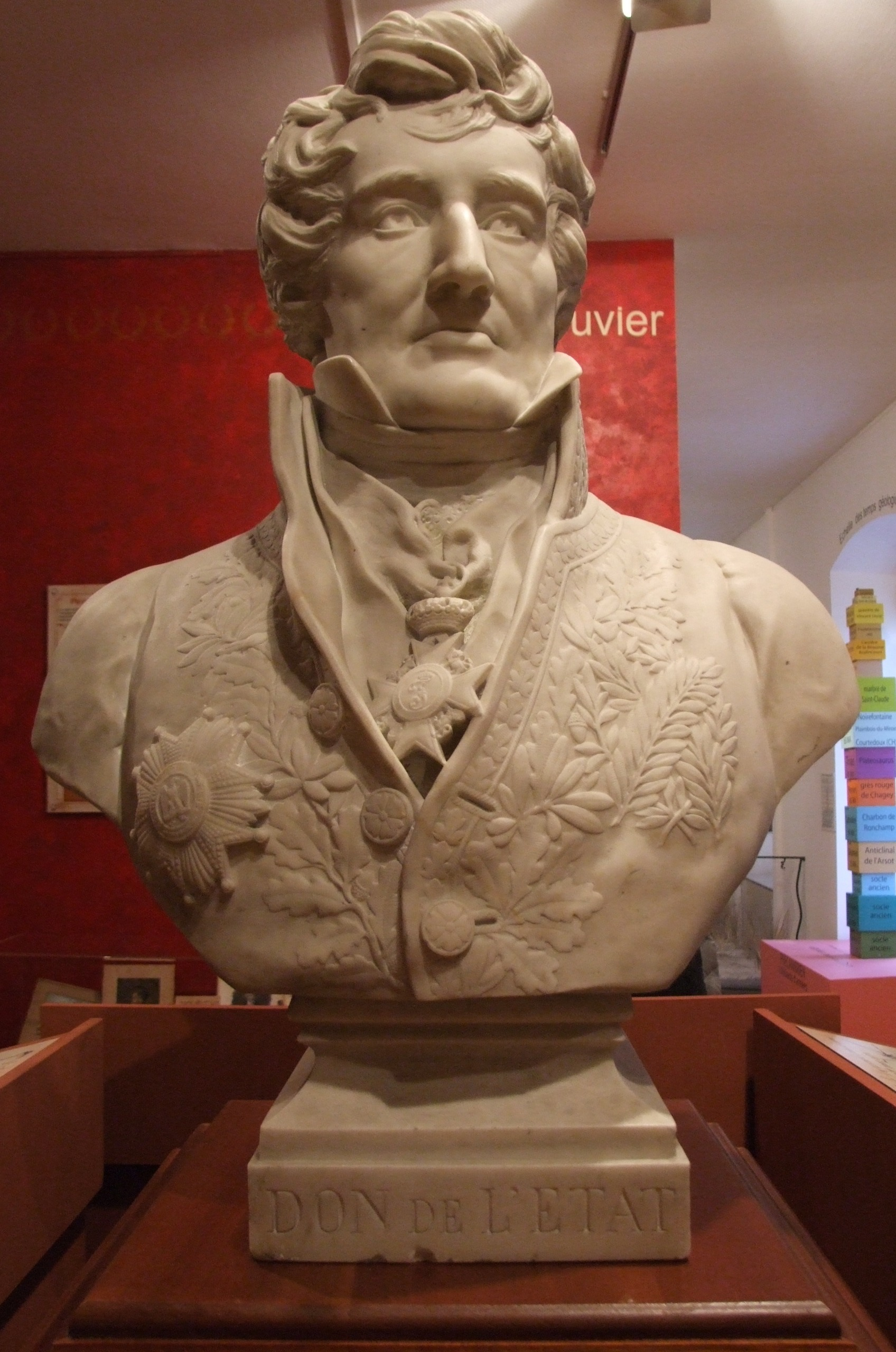 Buste de Georges Cuvier, Musée du château de Montbéliard, Montbéliard, Doubs, Franche-Comté, FRANCE